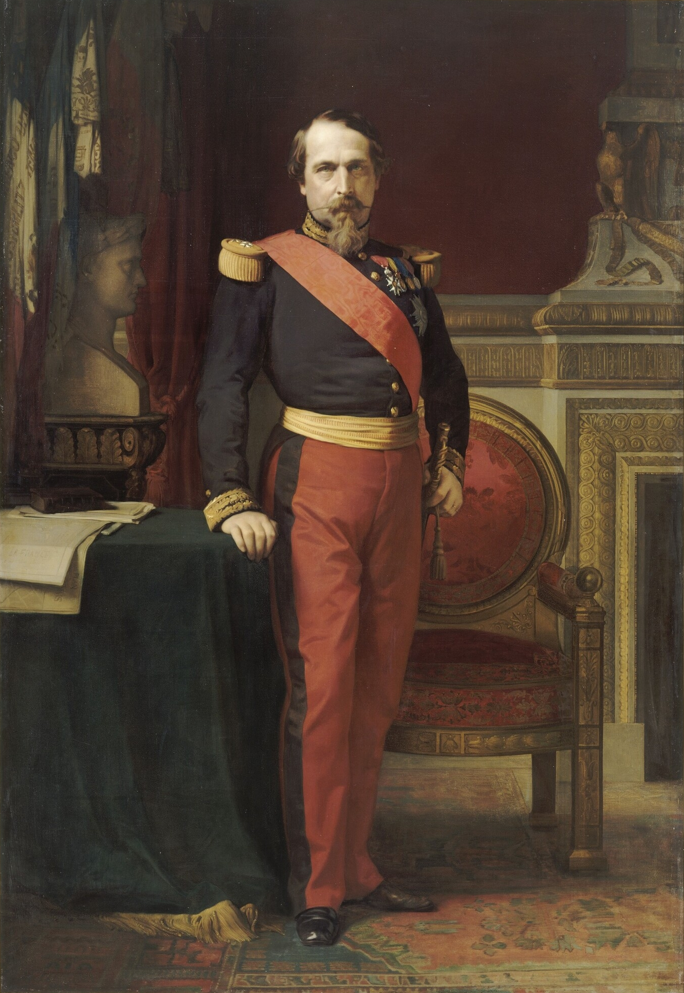 Caption from the museum's website L'empereur est présenté en uniforme d'officier général, dans son grand cabinet des Tuileries, à côté d'un buste de son oncle Napoléon 1er et devant un fauteuil de représentation. La commande du tableau en 1853, très vite annulée, fut reprise en 1862 et le tableau fut présenté l'année suivante au Salon, où il suscita de nombreux commentaires, notamment de Théophile Gautier : " M. Flandrin a rendu,avec une idéale perfection, le " Souverain moderne ", un des problèmes les ardus qu'il soit donné à la peinture d'aujourd'hui ", et considérant l'évolution du costume, " c'est donc par d'autres côtés que le peintre doit faire comprendre au spectateur qu'il a devant lui le Chef d'un grand Etat, et c'est à quoi M. Flandrin a réussi d'une façon admirable. Nulle emphase, nul apparat dans la composition du portrait, mais une majesté simple et tranquille qui s'impose sans effort… La tête est d'une ressemblance à la fois intime et historique. C'est l'homme et le souverain. " Les contemporains furent frappés en effet par la ressemblance du portrait, que l'empereur trouva sans doute trop réaliste et qui lui préféra le portrait moins austère, mais plus impersonnel, de Winterhalter. Le tableau fut présenté au musée du Luxembourg, lieu d'exposition des œuvres des artistes vivants, en 1864, avant d'être placé dans la salle du Conseil du Tribunal de Commerce de la Seine deux ans plus tard. Il entra à Versailles en 1884. F.L.